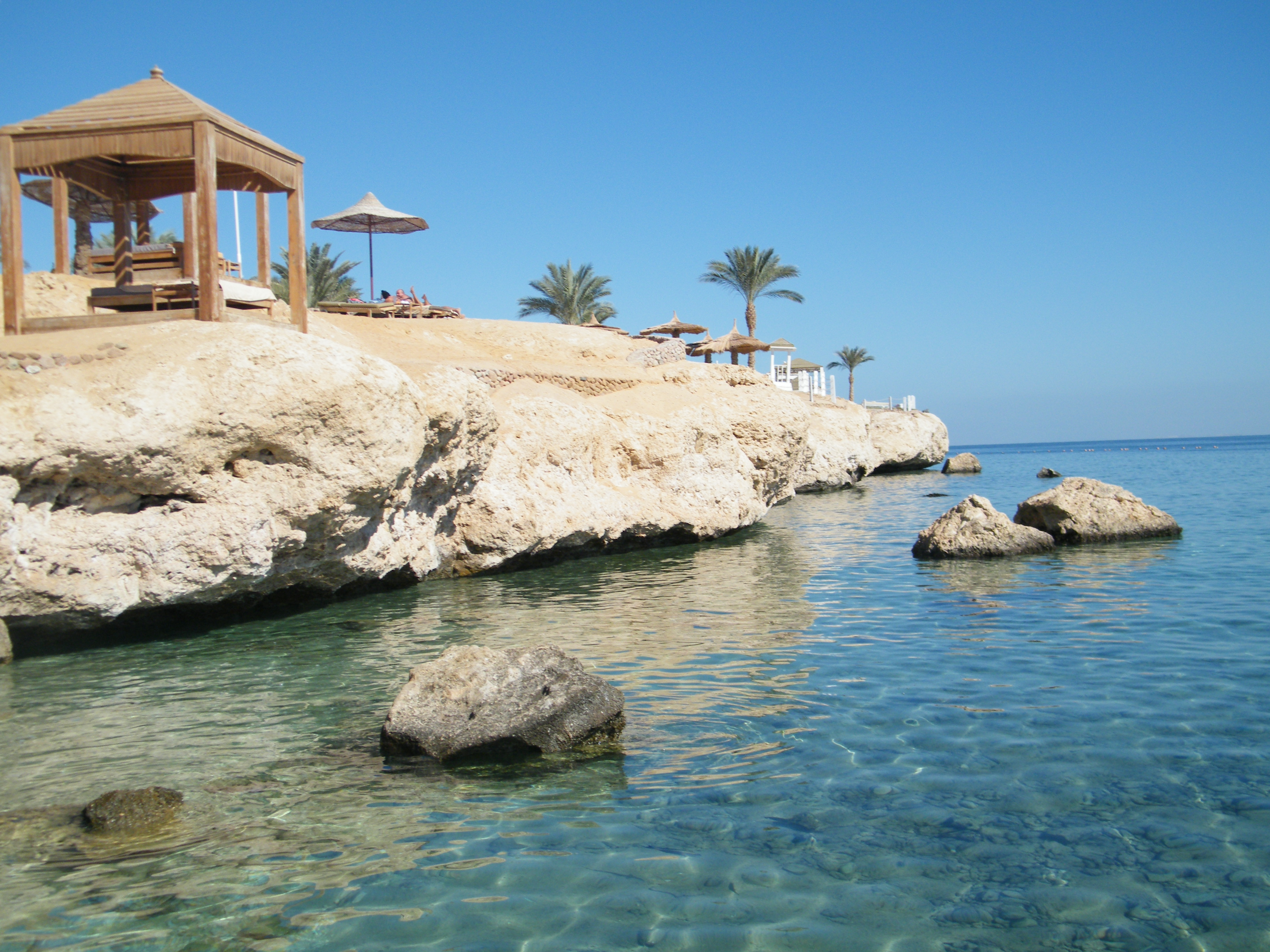 Пляж в отелі Монте-Карло, Шарм-еш-Шейх